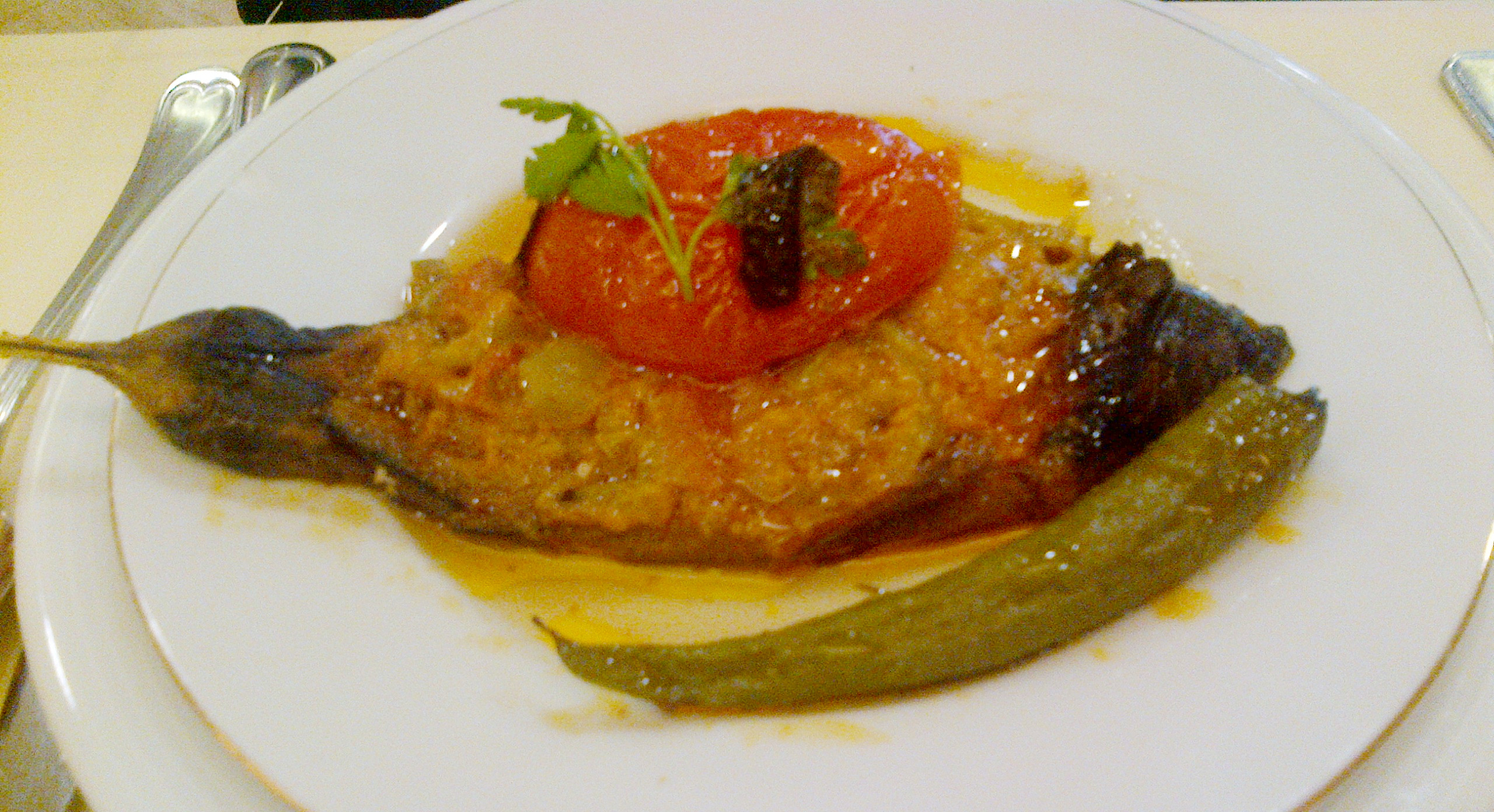 Imambayıldı (imambayıldı) de la cocina turca.